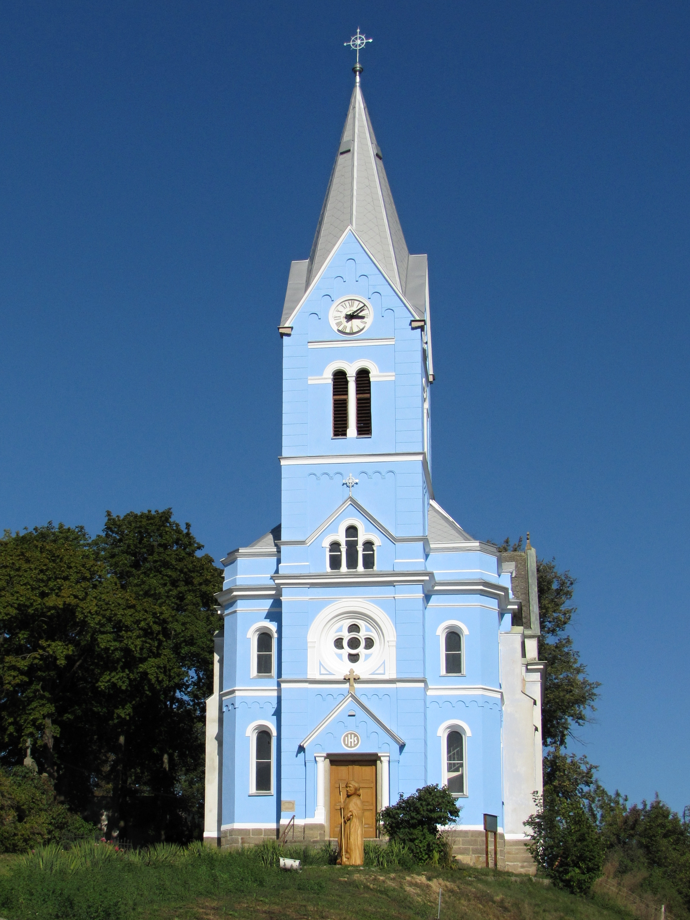 Neorománský kostel svatého Prokopa z let 1906–1908 ve Stříbrnicích